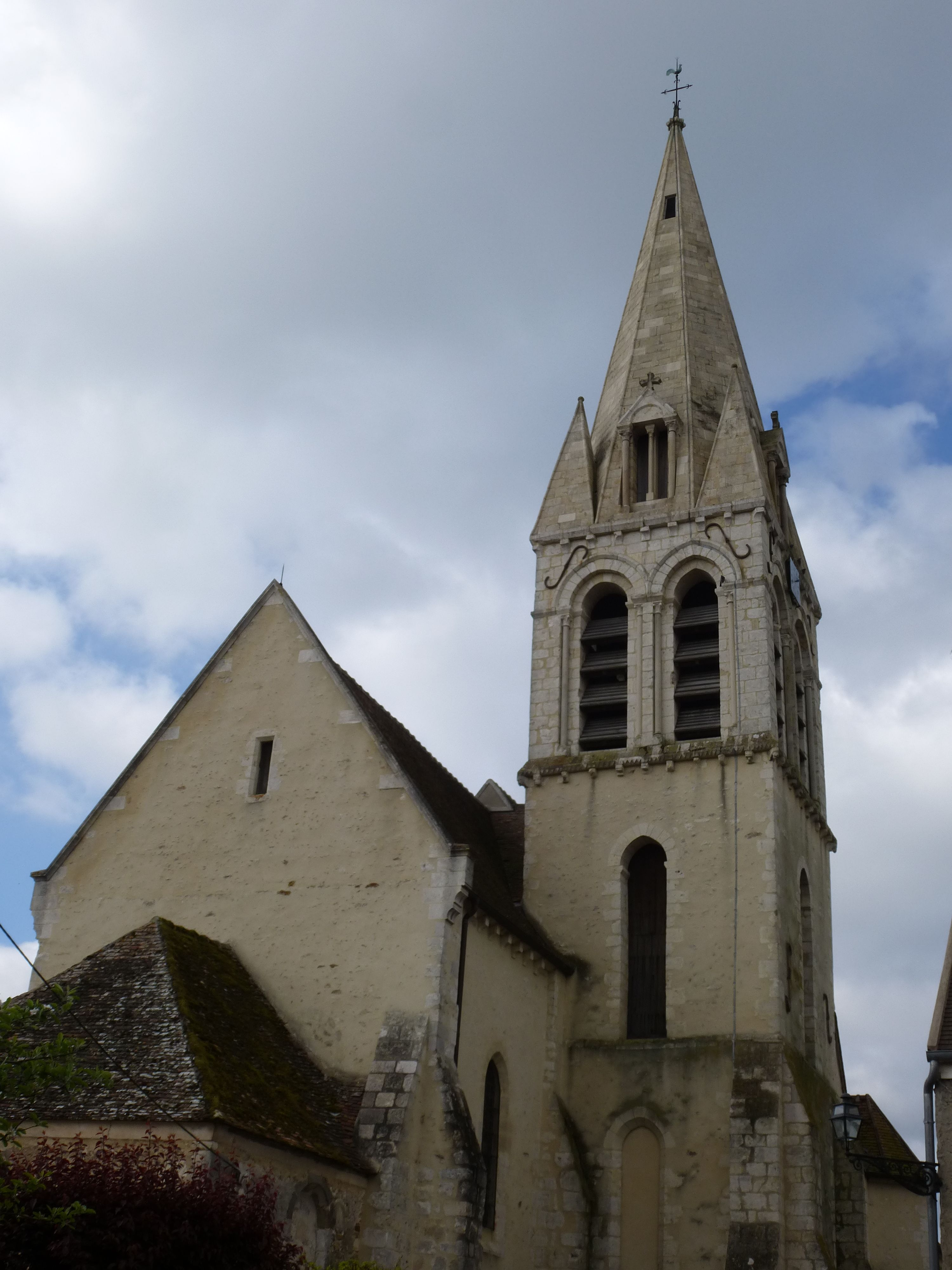 Église Saint-Martin de Moisenay. ( Seine-et-Marne, région Île-de-France).